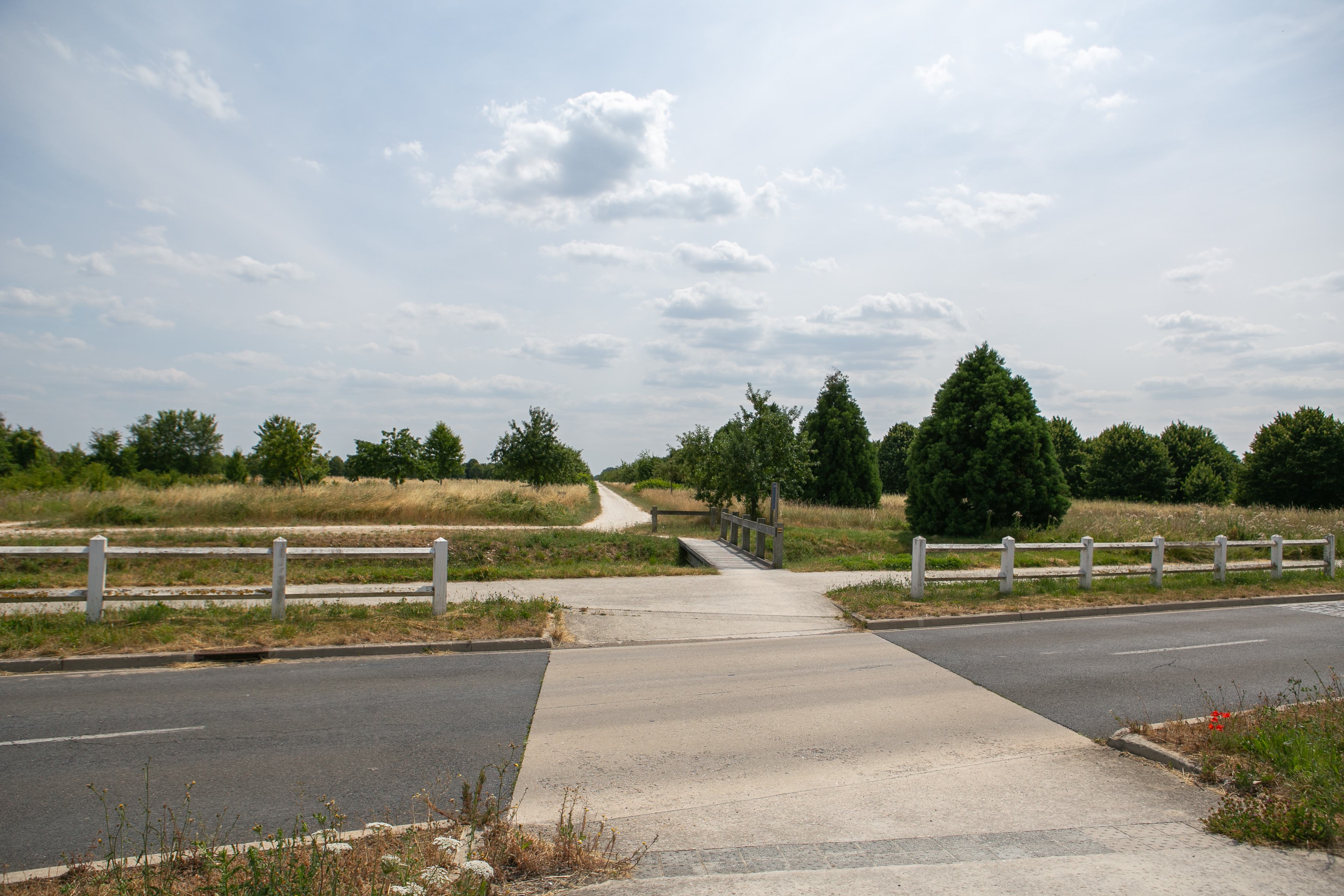 Vue de l'Allée royale de Sénart, au niveau de son intersection avec la Côte de la Communauté (Carré Sénart) / Lieusaint / Seine-et-Marne / France